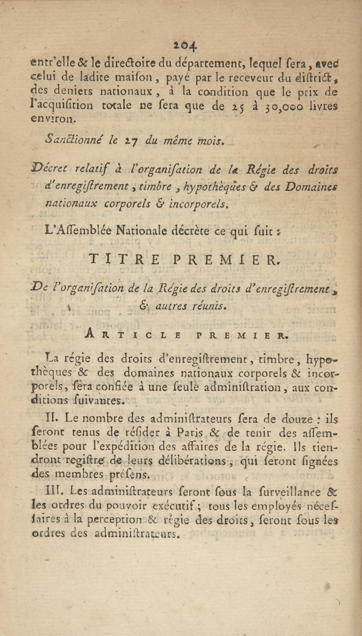 1ere page du décret du 17 mai 1791 portant organisation de la Régie de l'Enregistrement